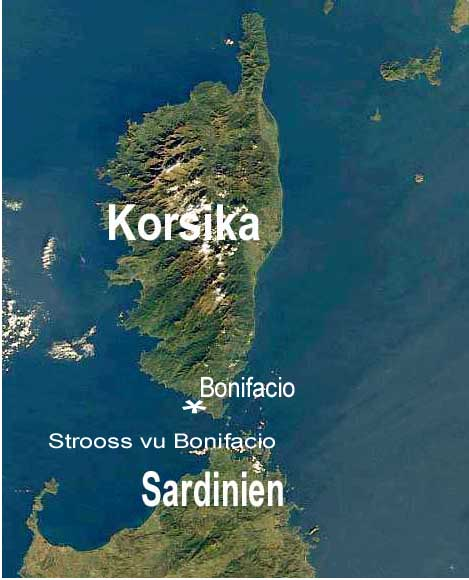 Satellitebild vu der Strooss vu Bonifacio.